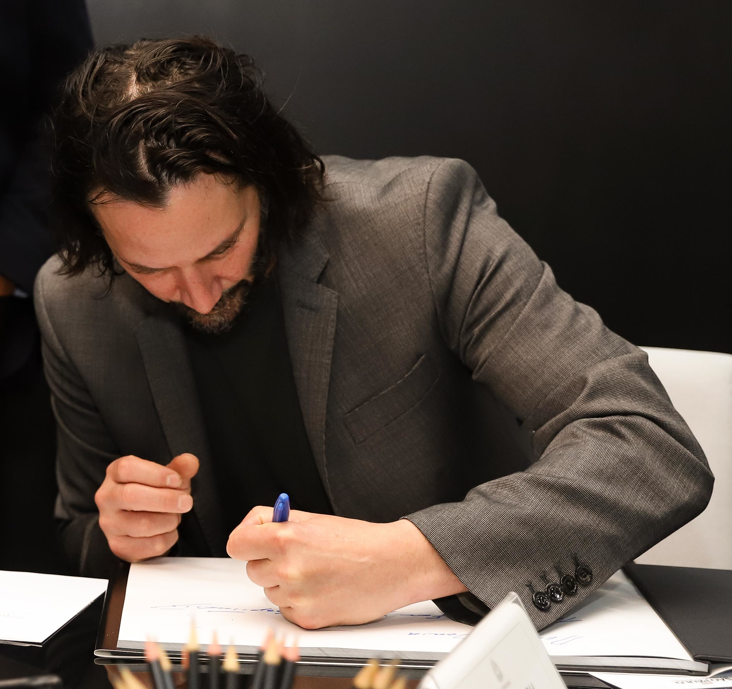 O governador de São Paulo, João Doria, participa de reunião com o ator norte-americano Keanu Reeves + Sec Sérgio Sá Leitão + Letícia Bragaglia, realizada no Palácio dos Bandeirantes. Local: São Paulo/SP. Data: 03/04/2019. Foto: Governo do Estado de São Paulo